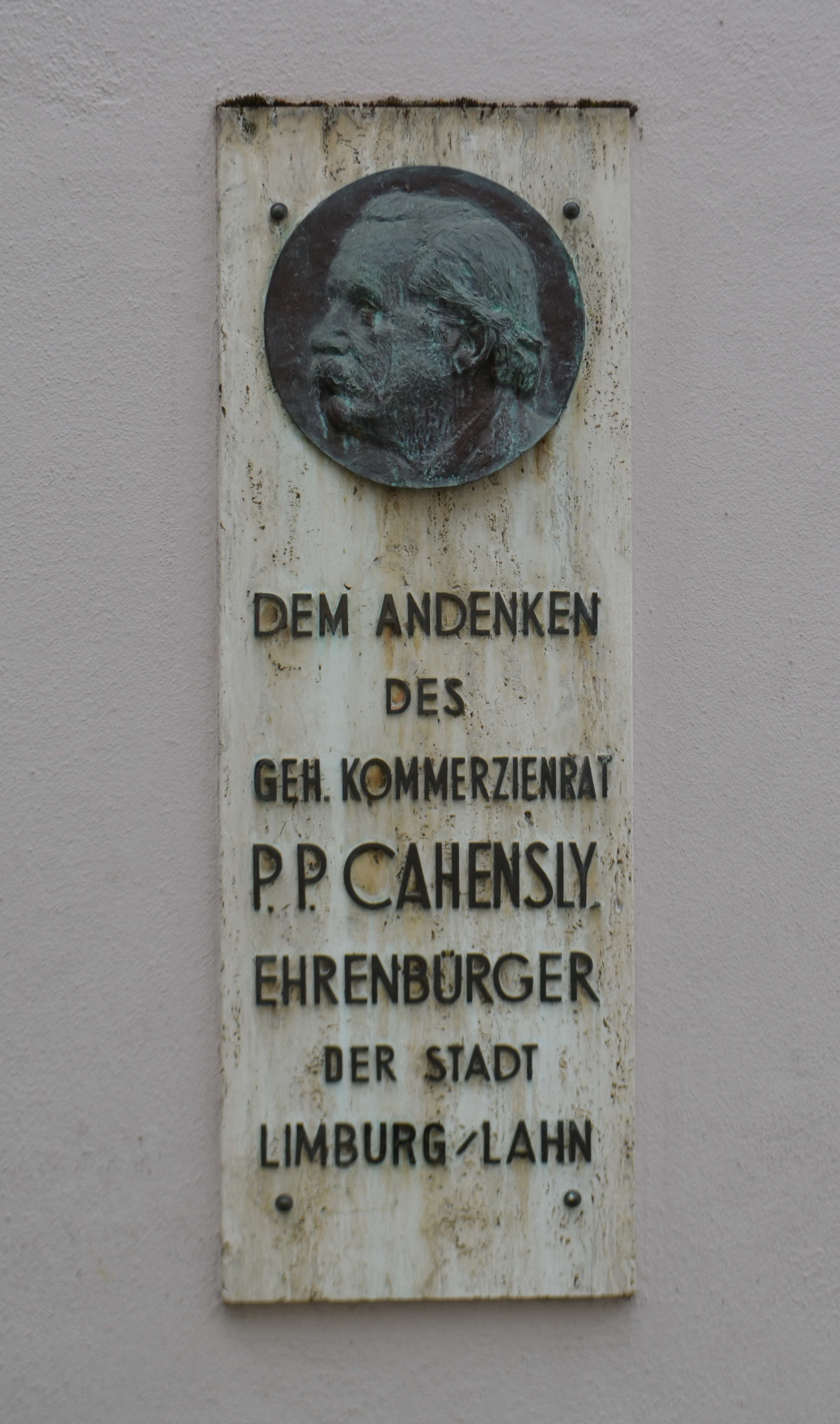 Limburg, Kornmarkt 9, Tafel Cahensly